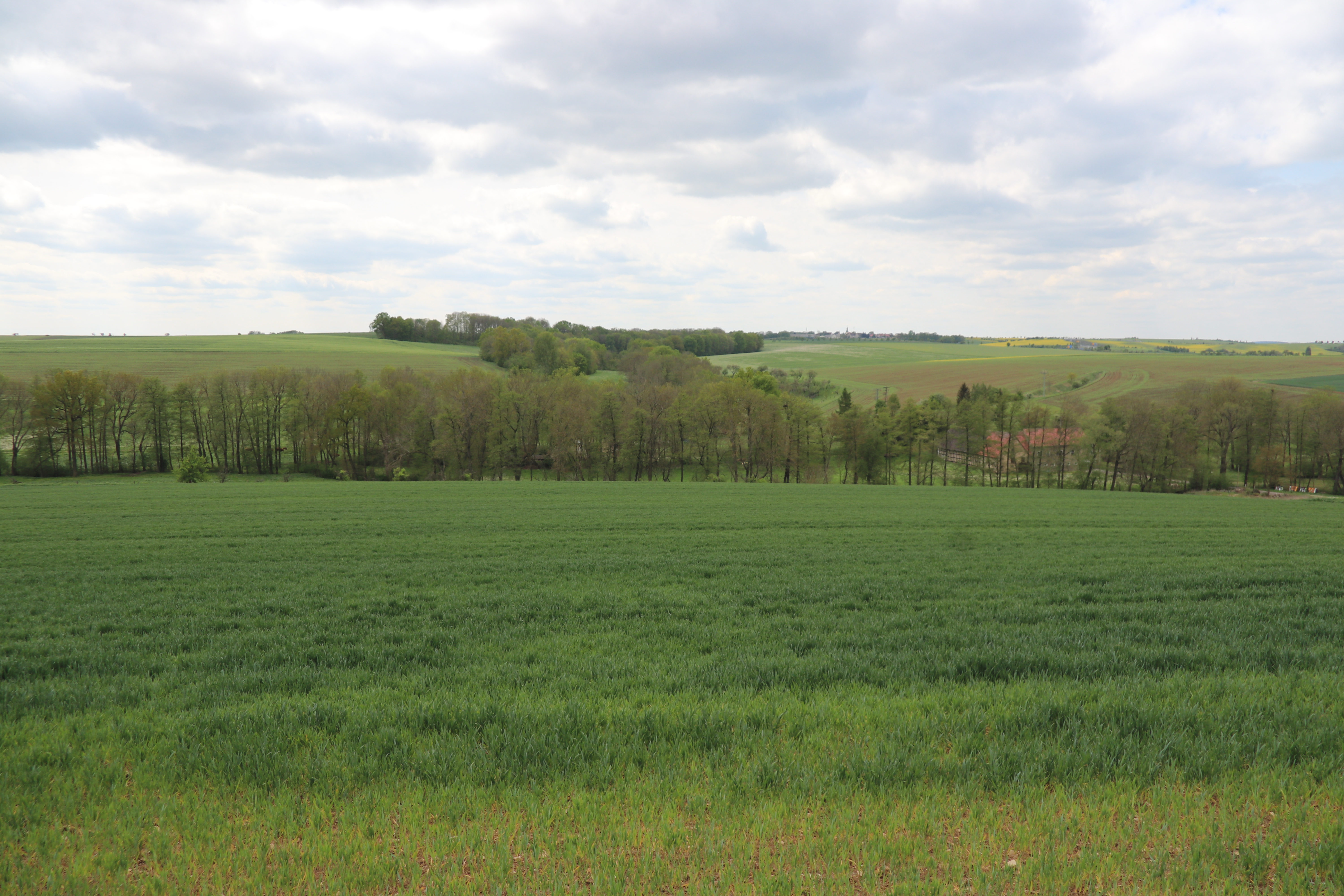 FFH-Gebiet Brahmeaue; Blick Richtung Süden auf Brahmeaue, südlich der L1079